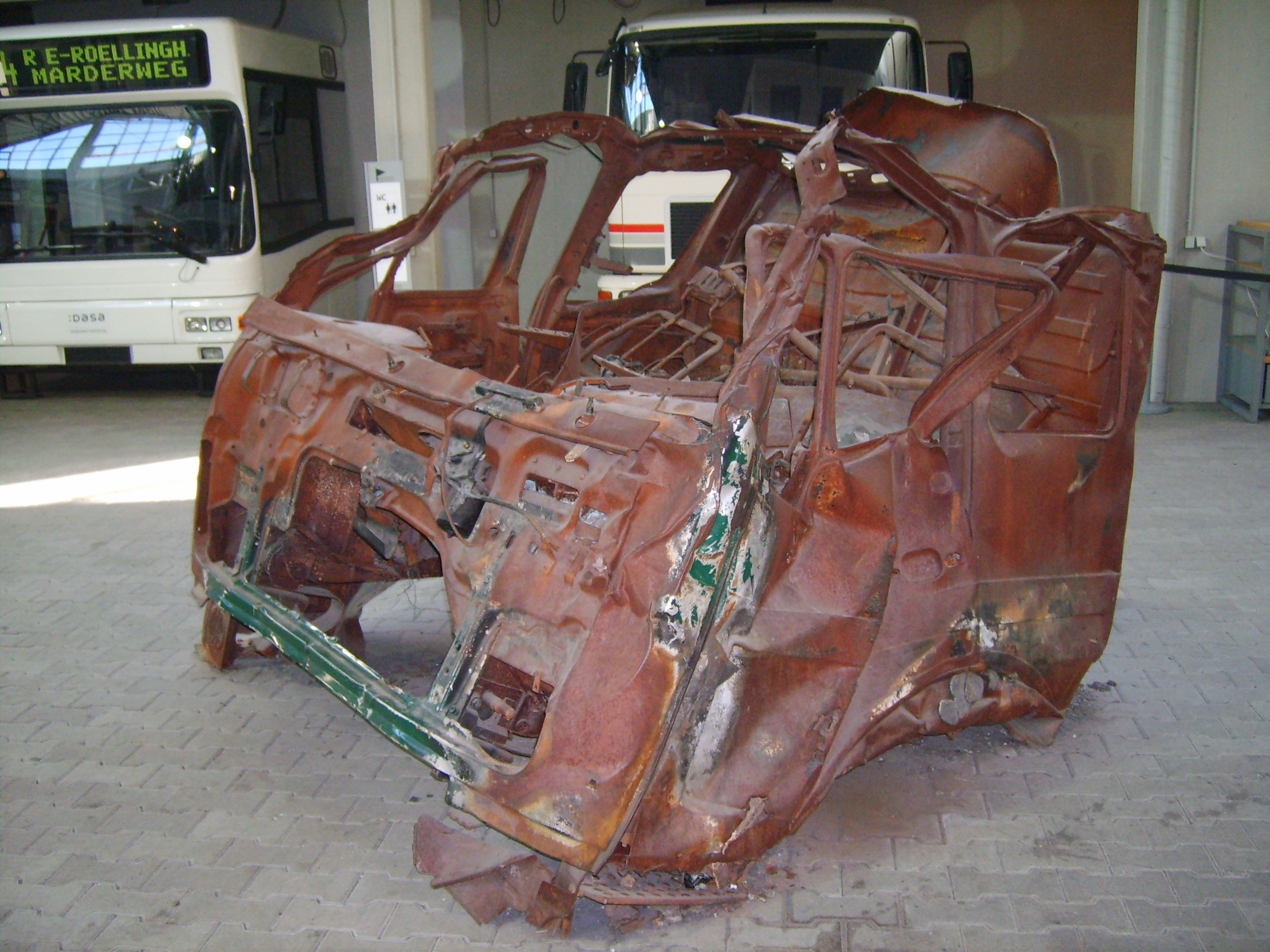 Wrack des Unfall-LKW von Herborn, ausgestellt in der DASA – Arbeitswelt Ausstellung, Dortmund